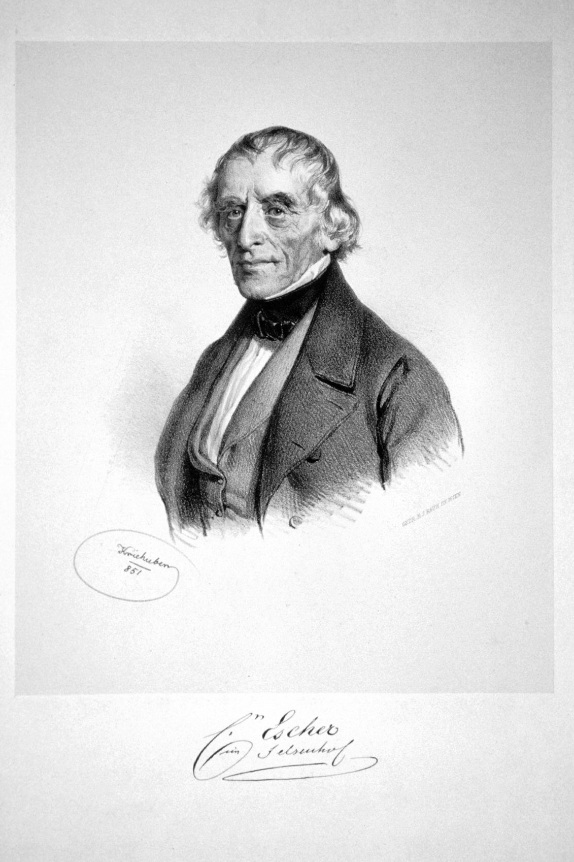 Hans Caspar Escher (1775-1859), Fründer der Fa. Escher, Wyss & Co.